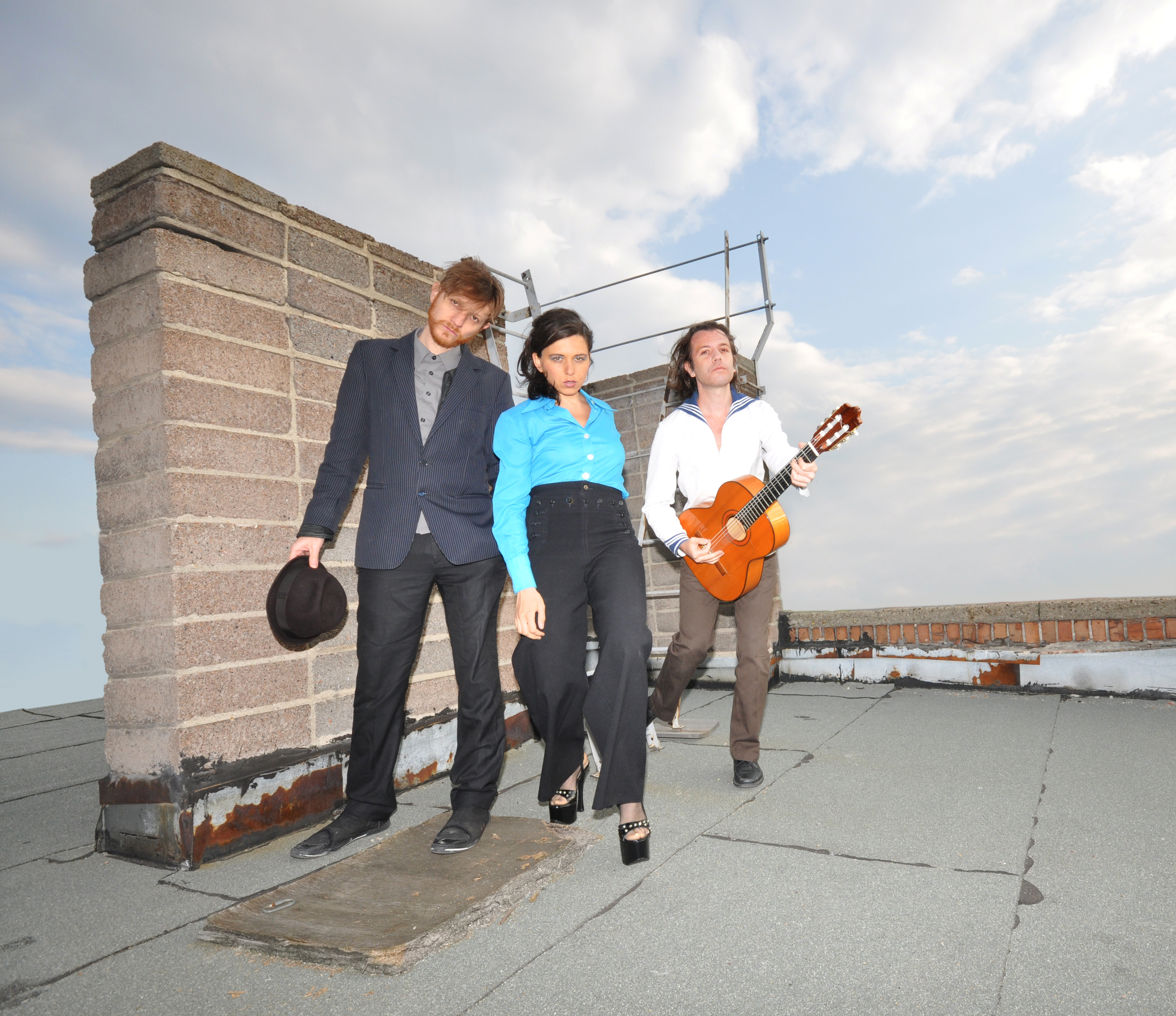 Offizielles Künstlerfoto 2013. v.l.: Alejandro Pardo, Caroline du Bled, Heiko Michels